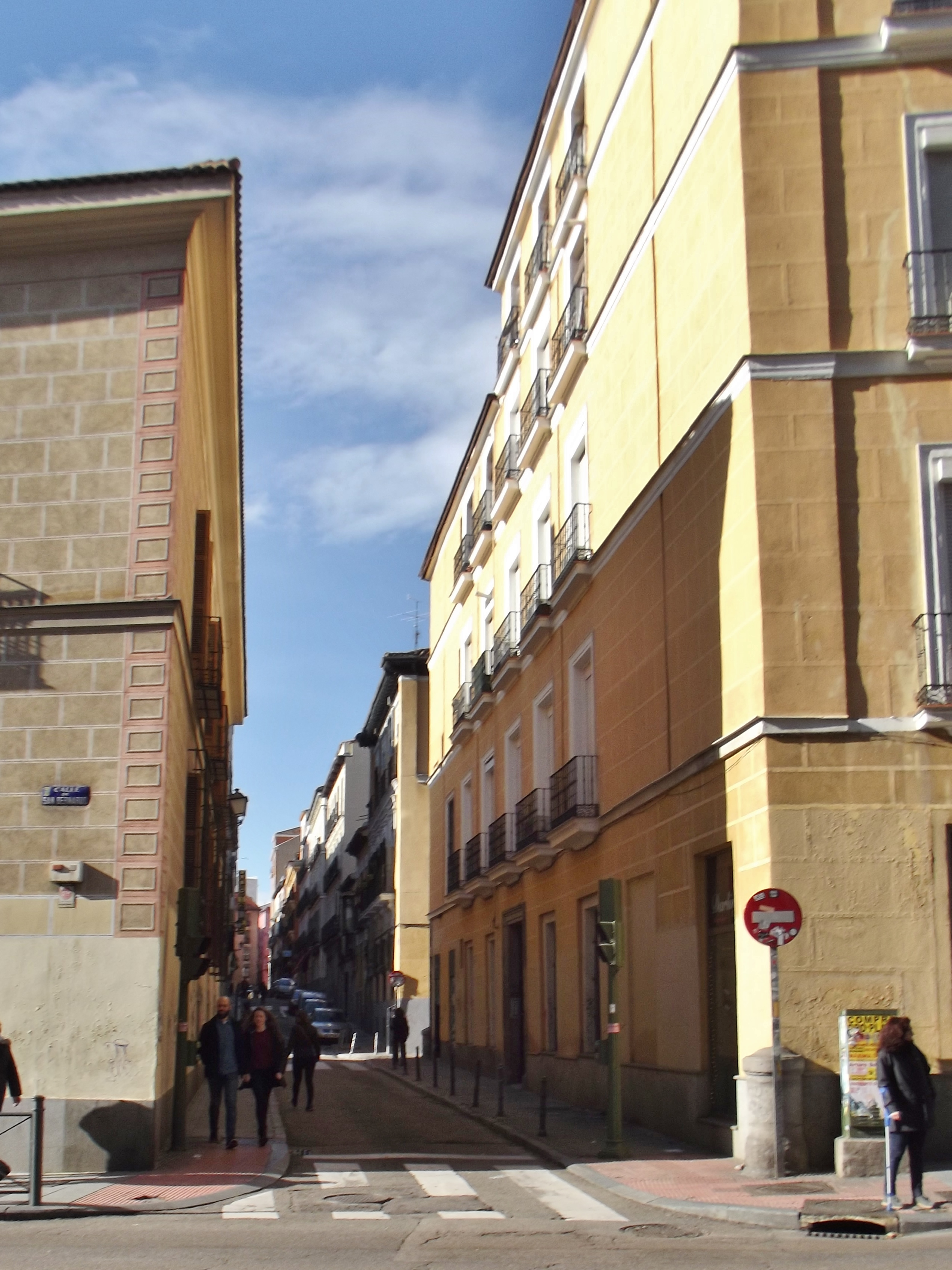 Calle de la Palma, Madrid.